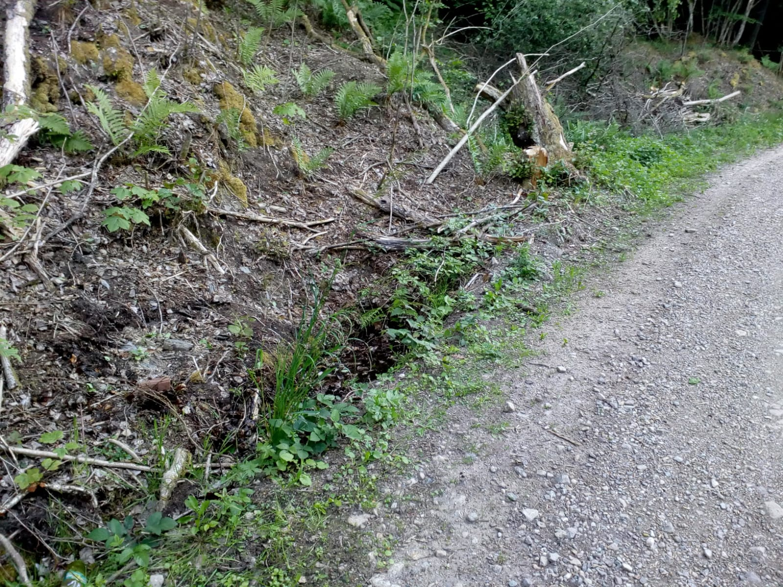 Mordbachborn im Quellgebiet des Mordbaches, Kleine Dhron, Hunsrück